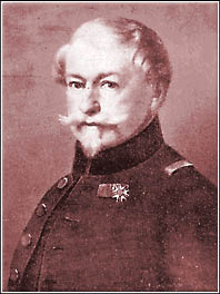 Julius von Plänkner